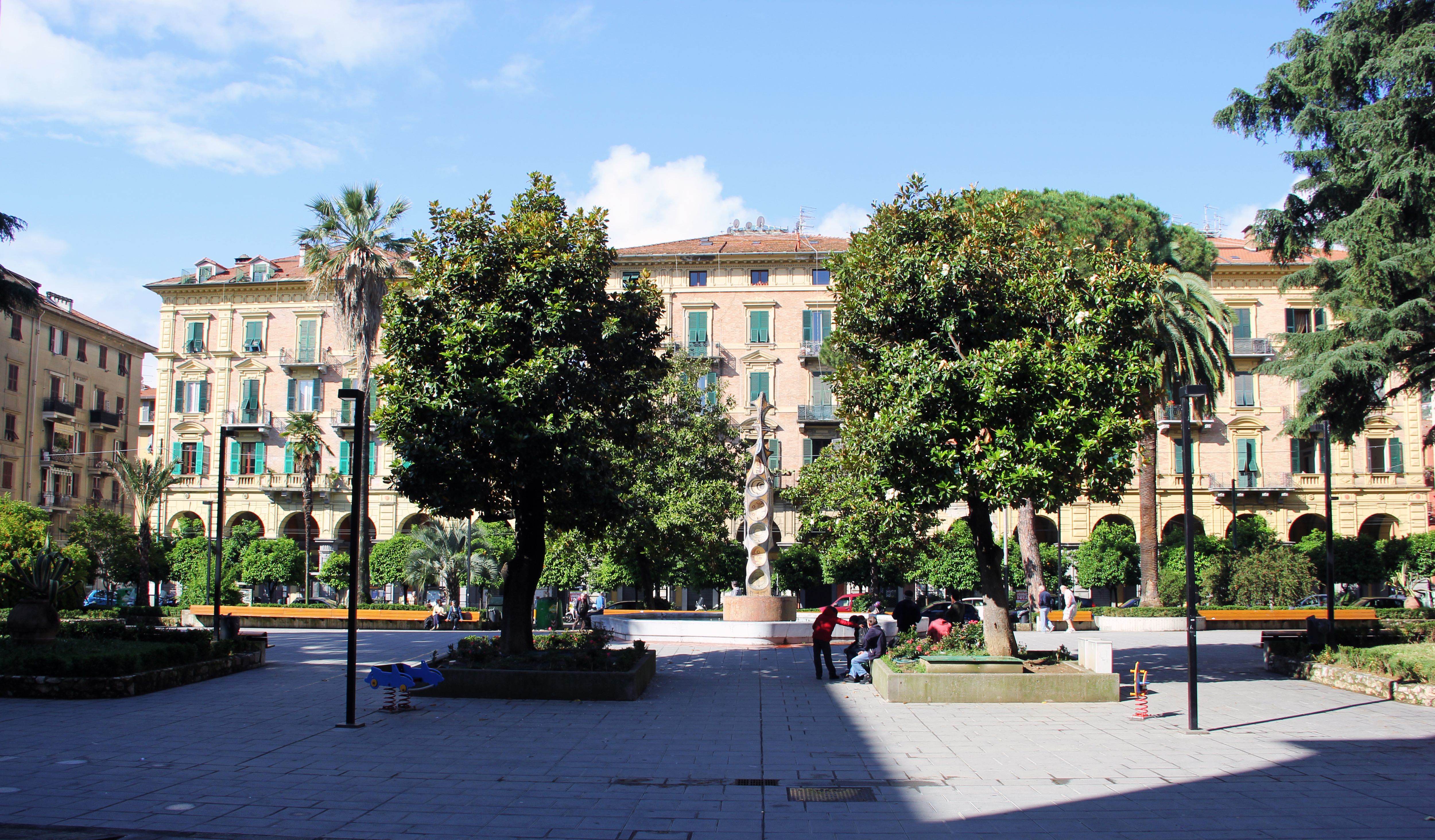 La Piazza sorge nel centro del quartiere Umberto I alla Spezia. Costruita nel XIX° secolo, è stata restaurata nel 2004. Al centro della piazza si trova la fontana, chiamata fontana delle voci, formata da vari materiali, secondo il progetto di Mirko Basaldella, portato a termine nel 1955.